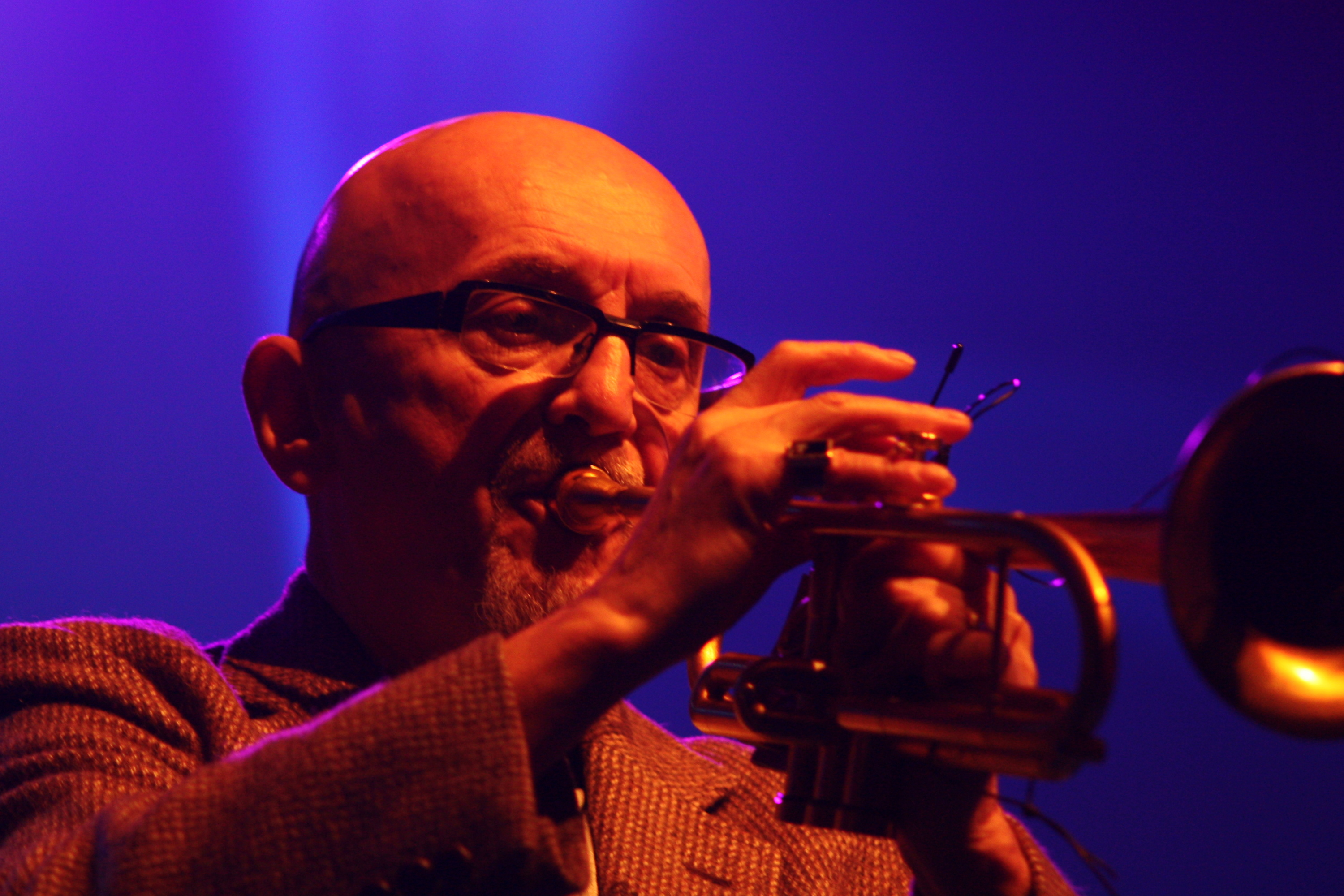 44. Deutsches Jazzfestival Frankfurt 2013: Tomasz Stanko